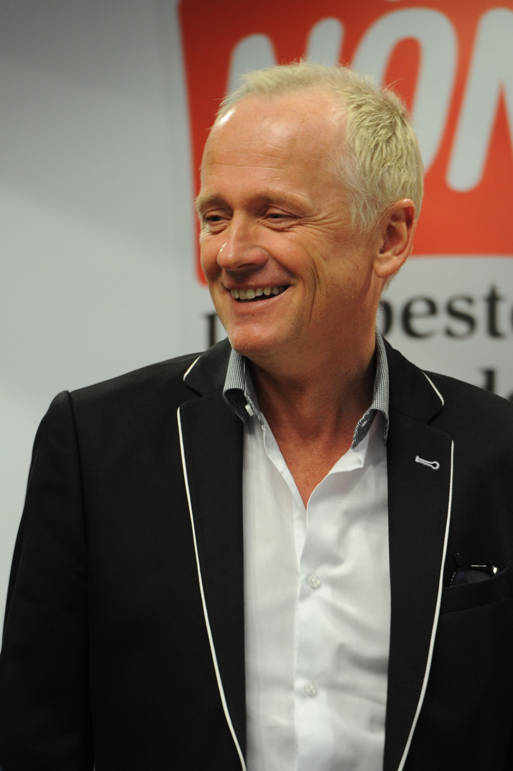 Landtagswahl in Niederösterreich am 3. März 2013: Andreas Marek